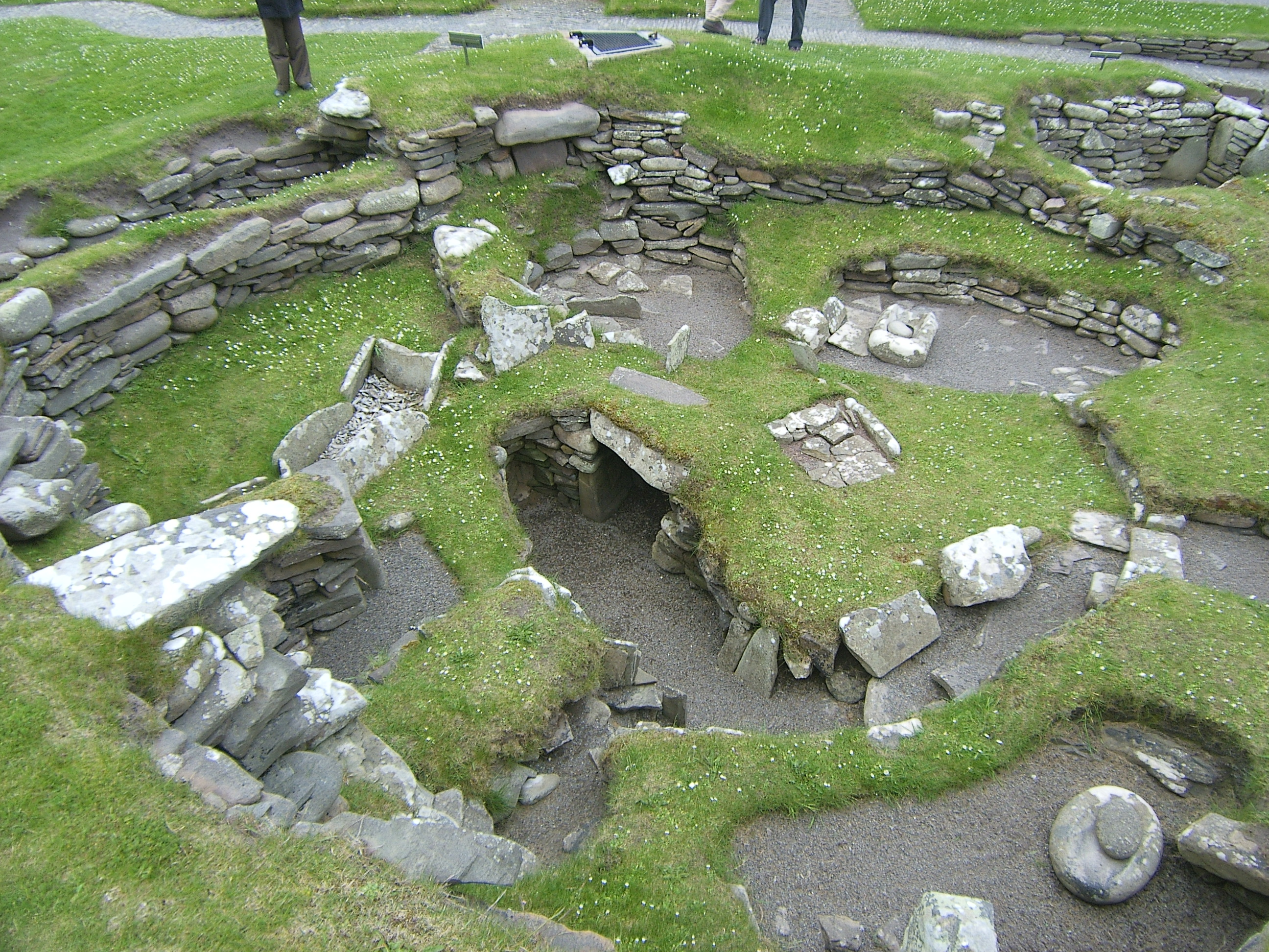 Site archéologique de Jarlshof, situé dans le sud des Shetland, en Écosse.